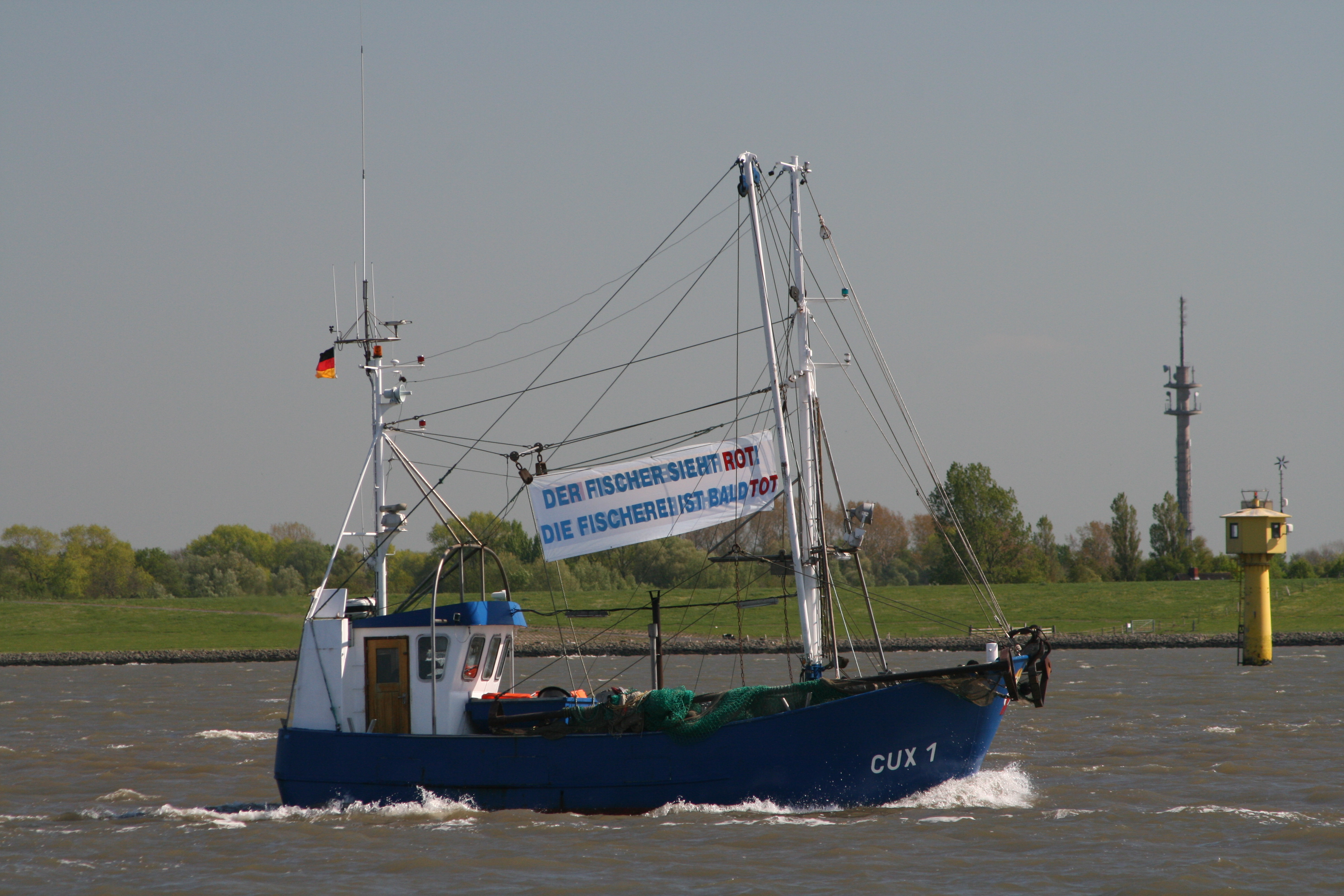 Fischerprotest vor Otterndorf am 4. Mai 2007 CUX 1 - CUXI